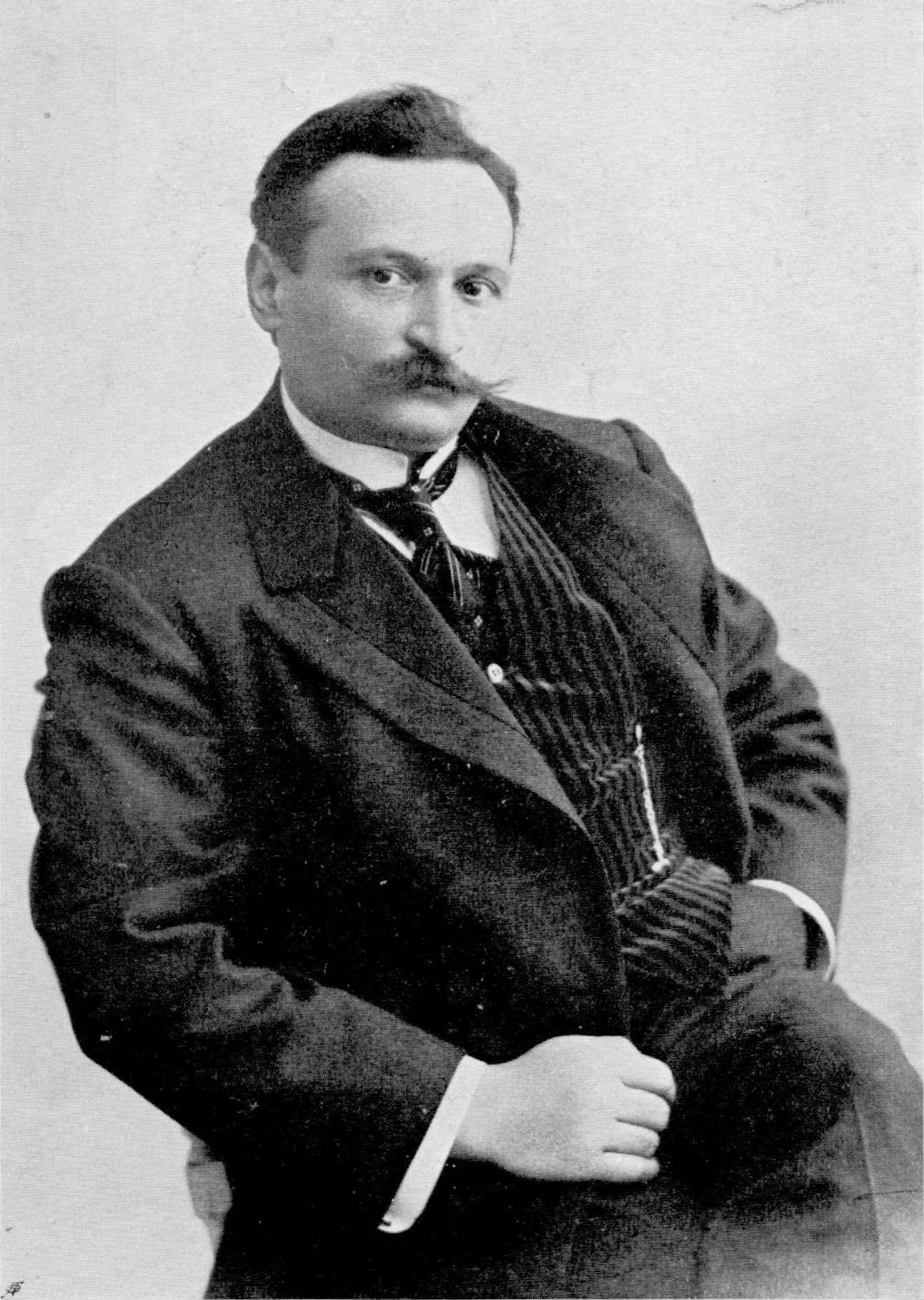 Ο Τεβφίκ Φικρέτ (1867 - 1915).